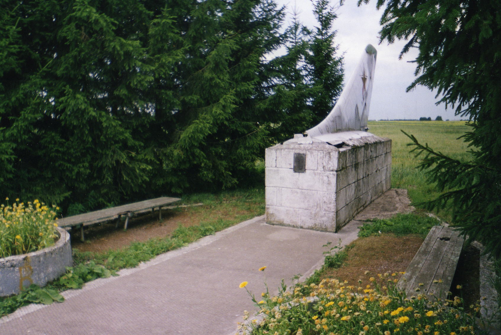 Памятник на месте падения транспортного самолёта 19 апреля 1977 года